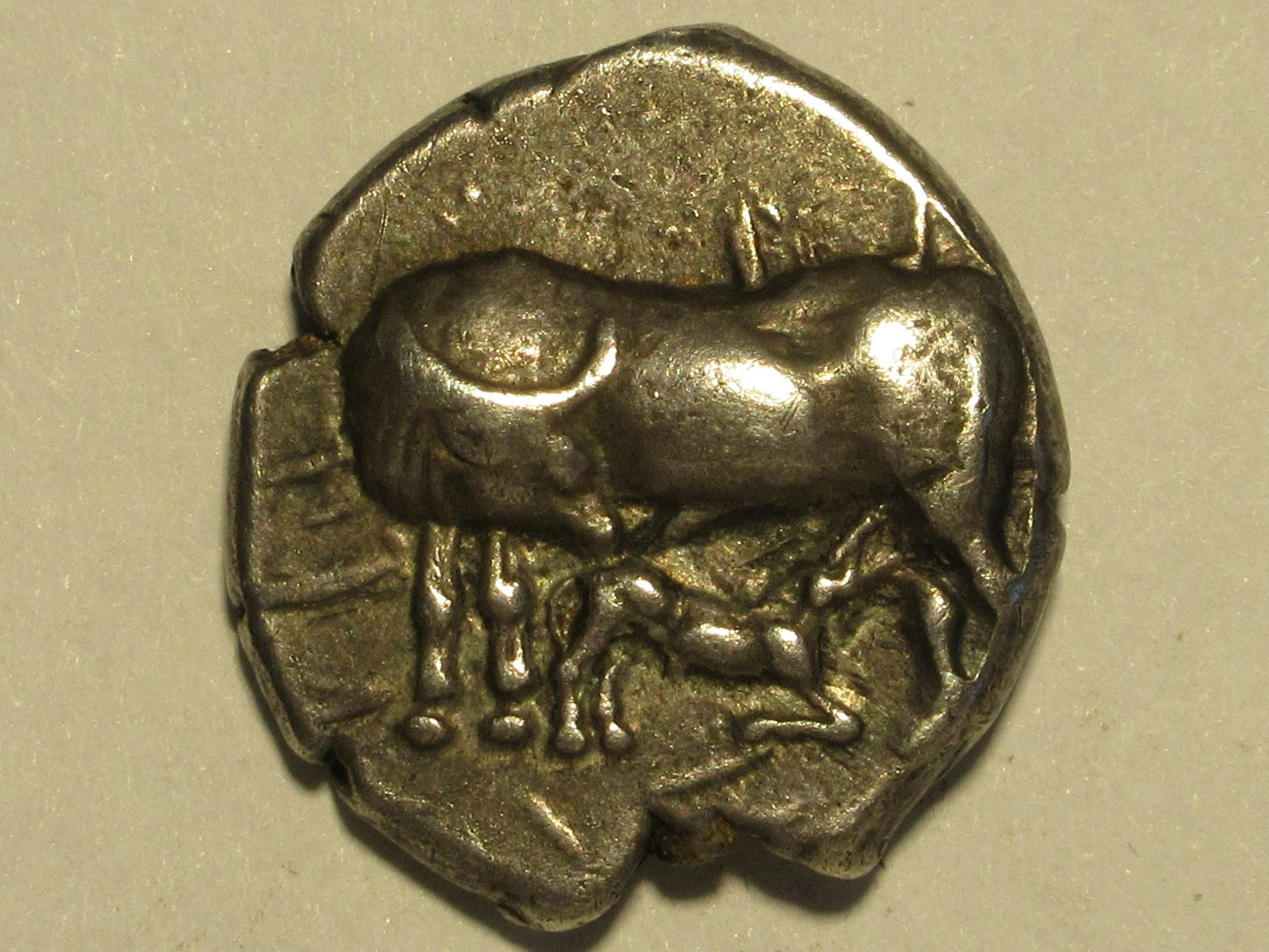 Stater aus Korkyra, ca. 450-400 v. Chr., Szaivert/Sear 2284